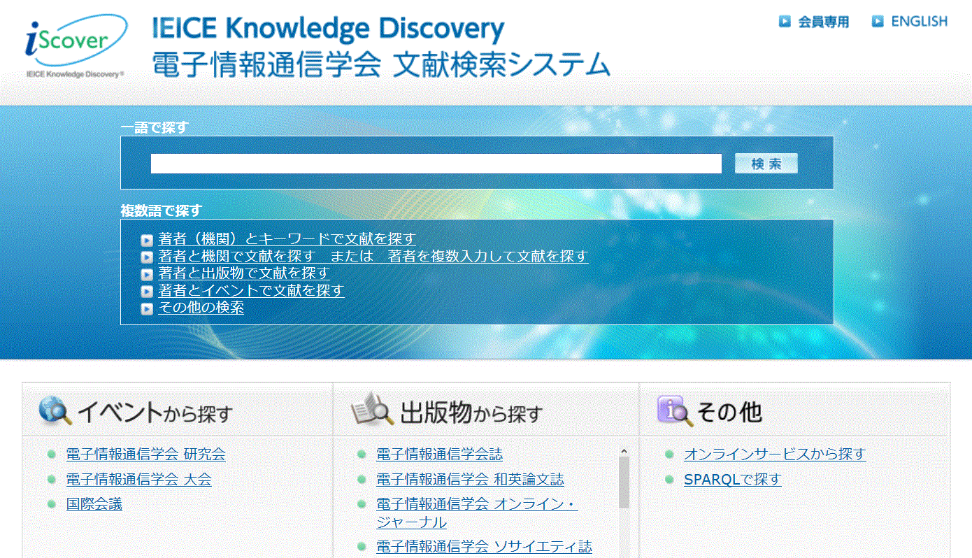 I-Scoverの検索インタフェース